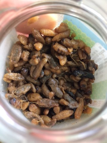 Jed